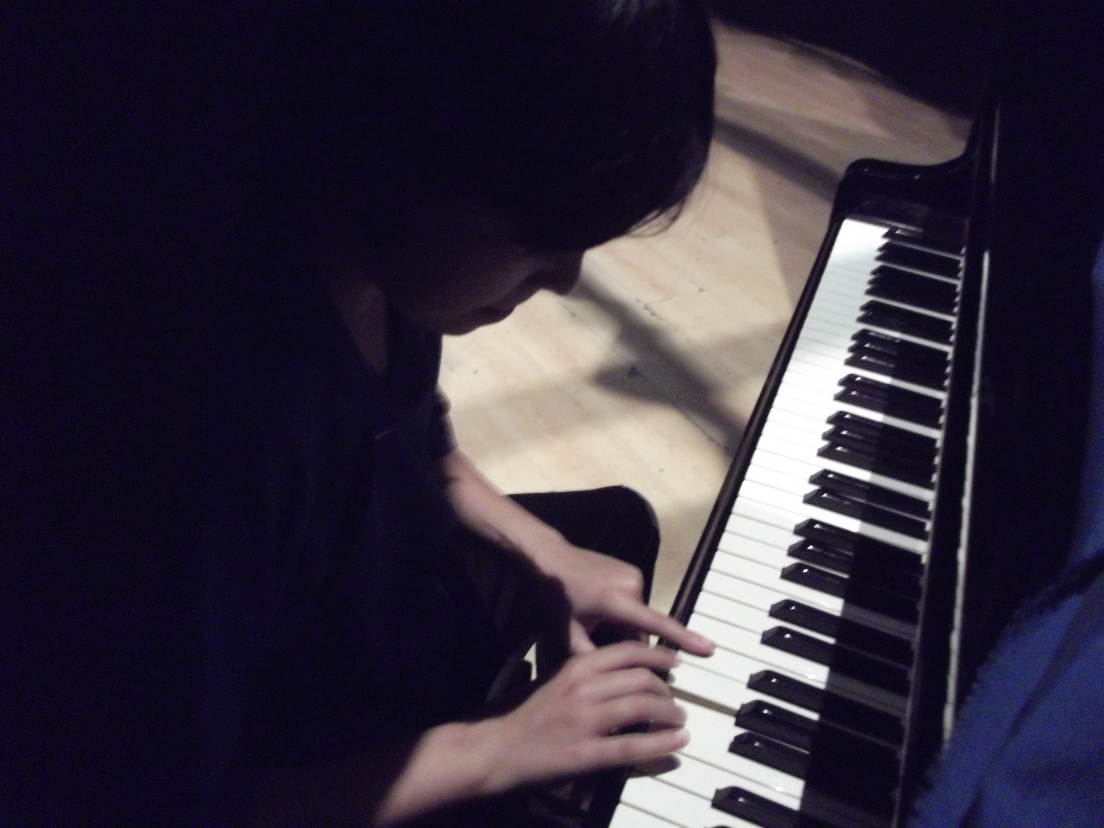 Alumno de 6º de primaria componiendo la música para el proyecto Lóva